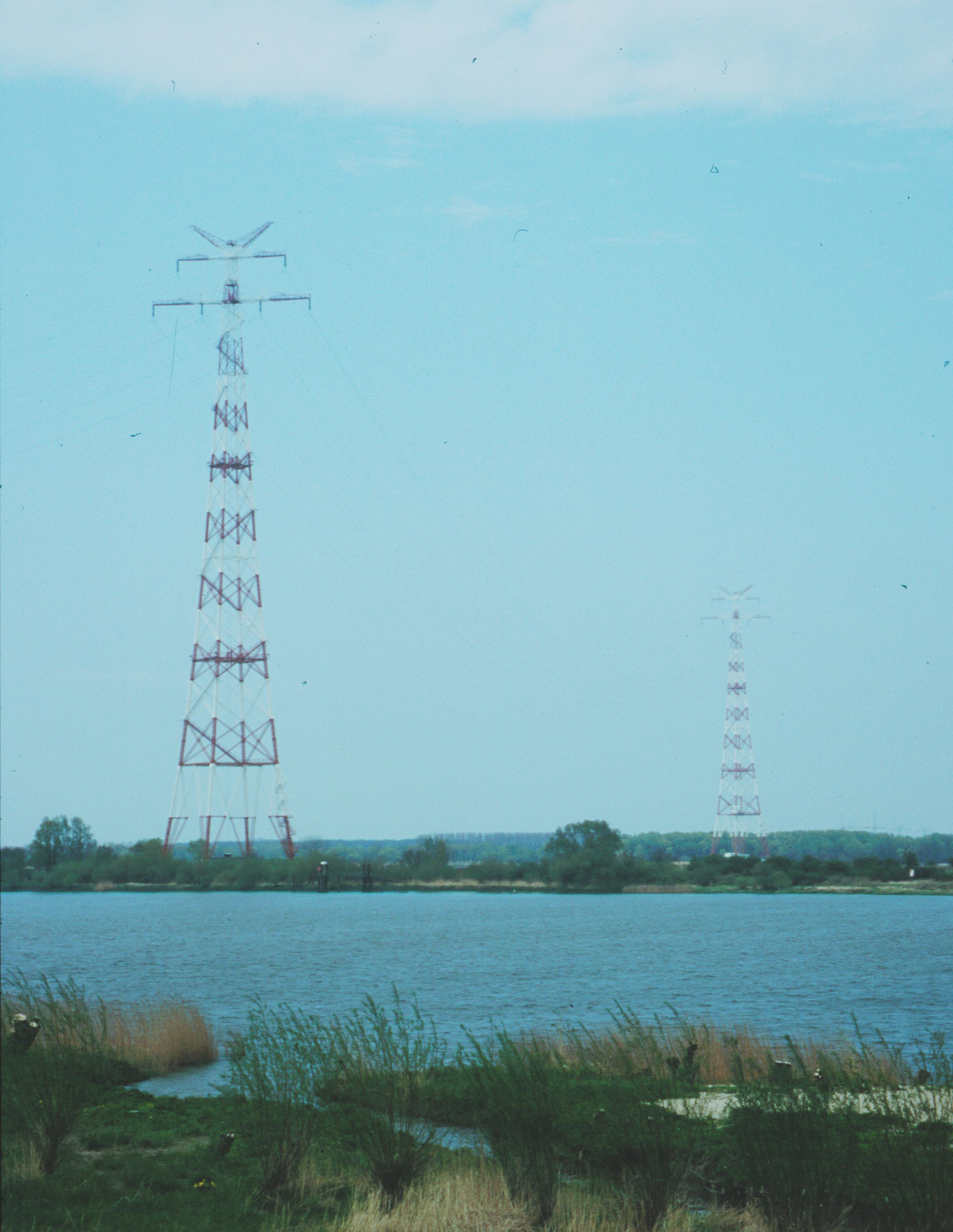 Masten der Elbekreuzung 1, gesehen vom südlichen Elbufer (Twielenfleth) aus. Der vordere Mast (links) steht auf der Elbinsel Lühesand.